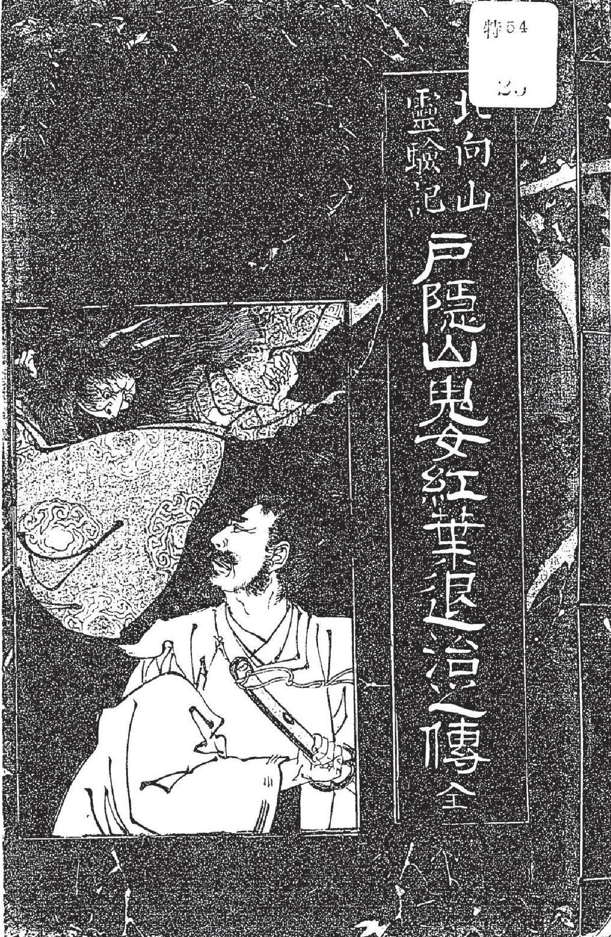 1903年明治36年に発行された鬼女紅葉退治の小説表紙。国立国会図書館近代デジタルライブラリーより